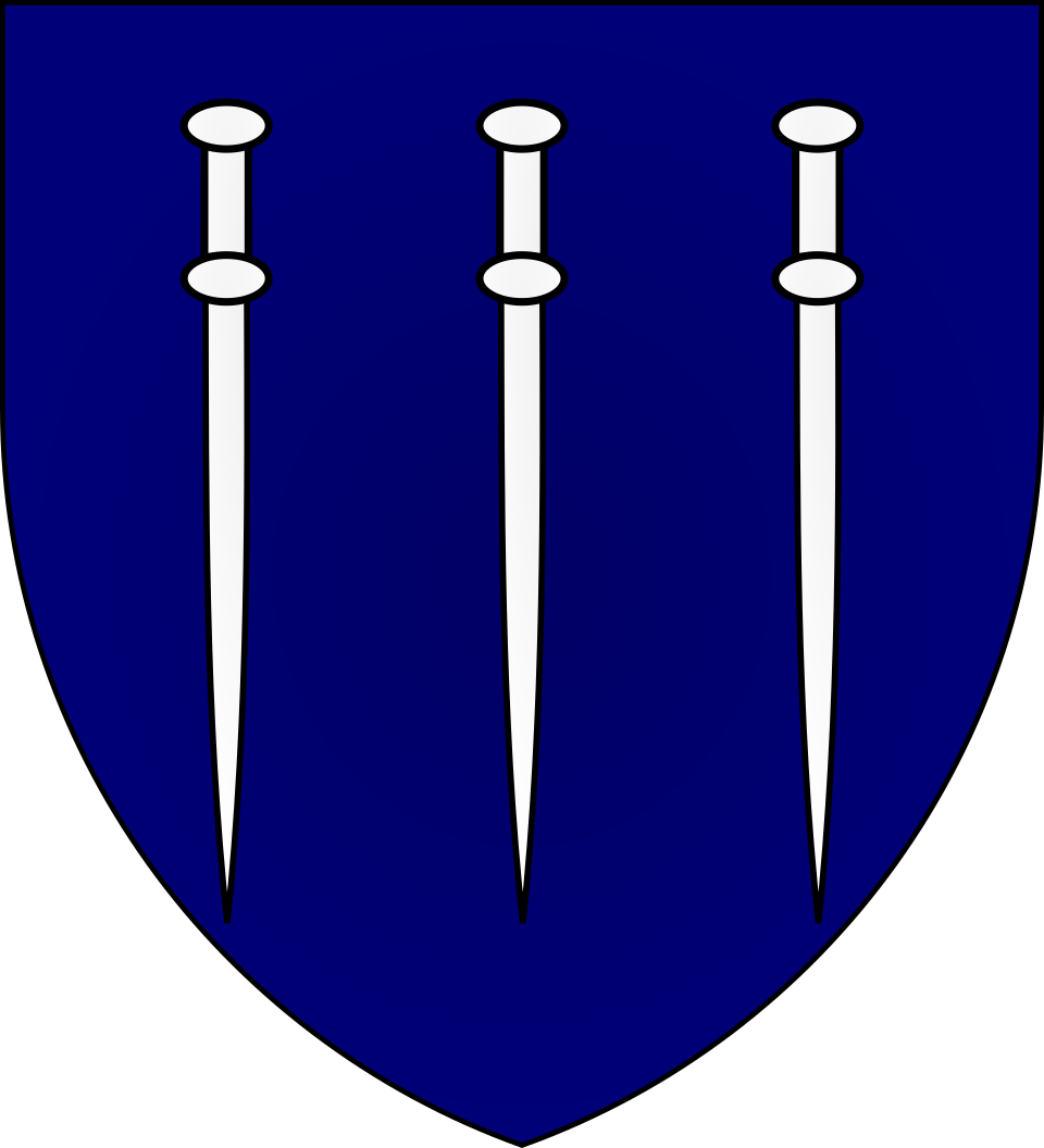 Ecu de la famille de Maurey : d'azur à trois bourdons de pèlerin d'argent, posés en pal, rangés en fasce. (Pseudo-Pédraton)